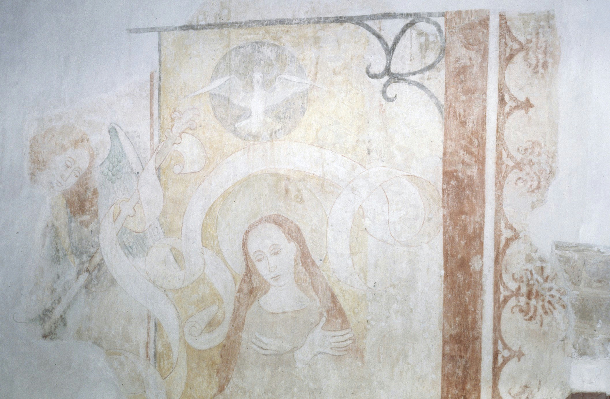 Nederlands Hervormde Kerk: INTERIEUR, NOORDMUUR, MUURSCHILDERING (VERKONDIGING AAN DE HEILIGE MAAGD MARIA), DETAIL